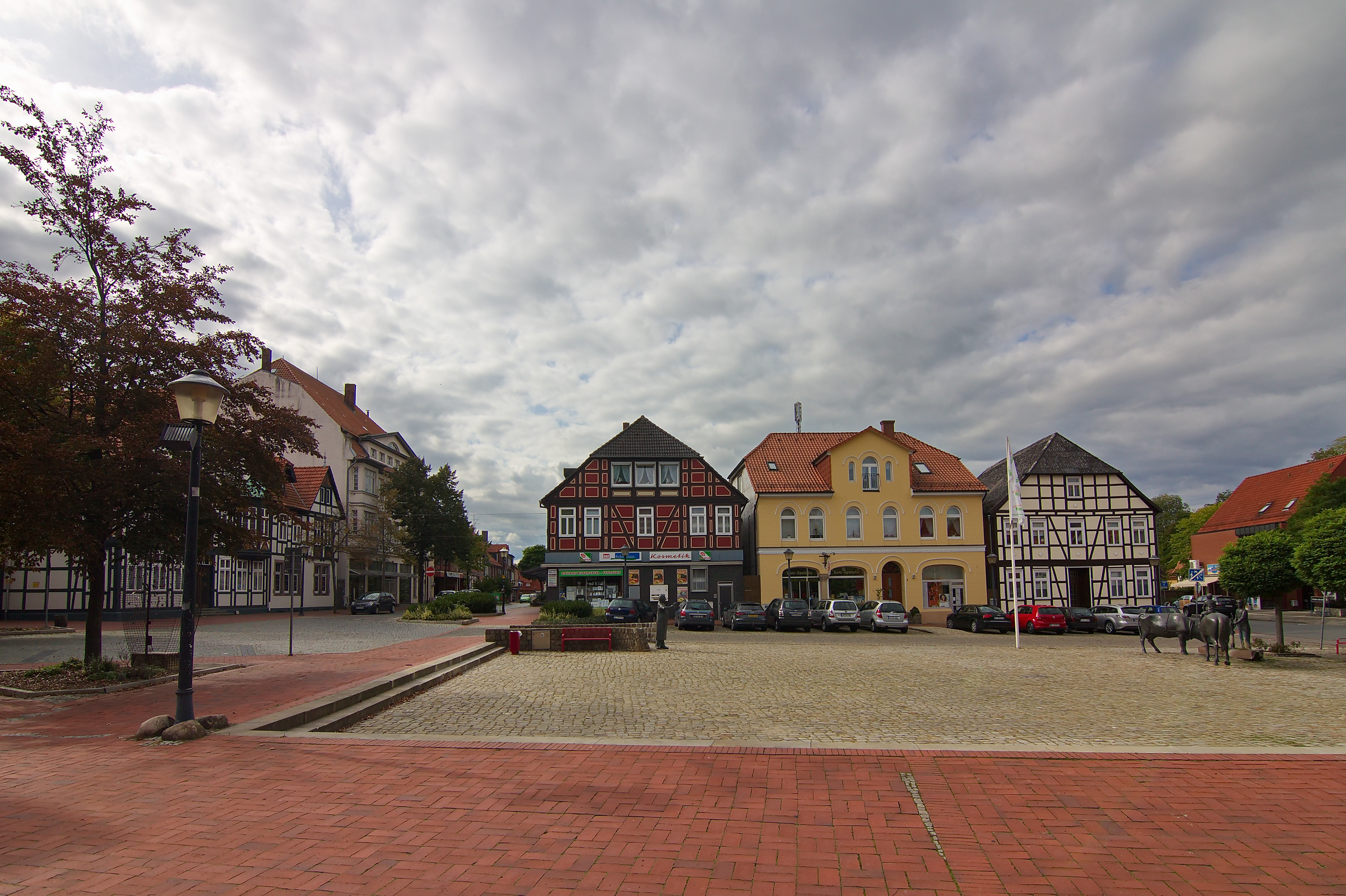 Otsblick in der Altstadt von Wittingen, Niedersachsen, Deutschland